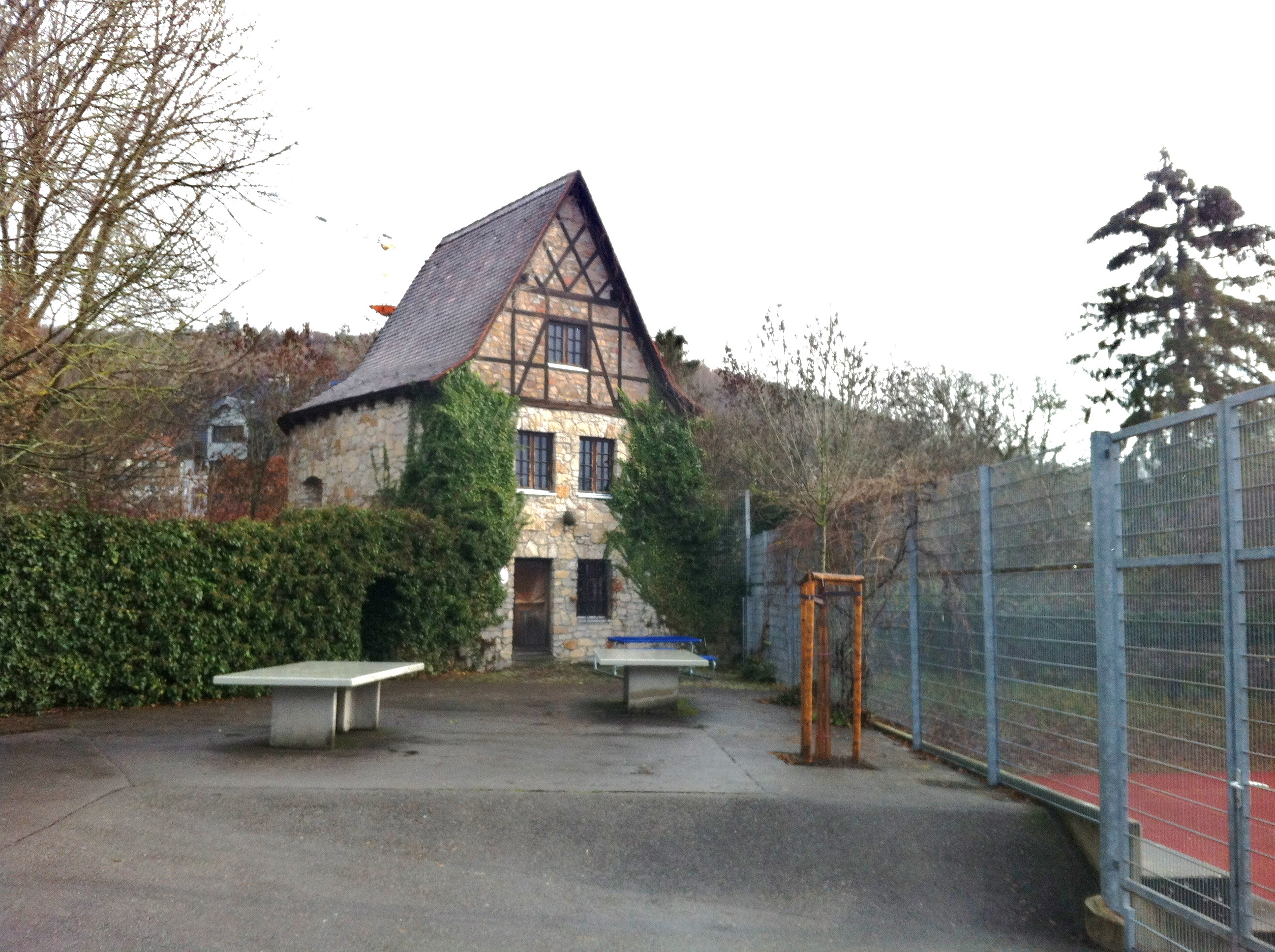 Der Stadtturm Luginsland von Waldshut, Stadtteil von Waldshut-Tiengen im Landkreis Waldshut in Baden-Württemberg. Standort des Nord-Ost-Turms am Pausenhof des Hochrhein-Gymnasiums Waldshut, zur Schlucht des Seltenbach.